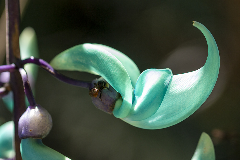 Strongylodon macrobotrys at Lankester Garden. Paraíso de Cartago. Costa Rica